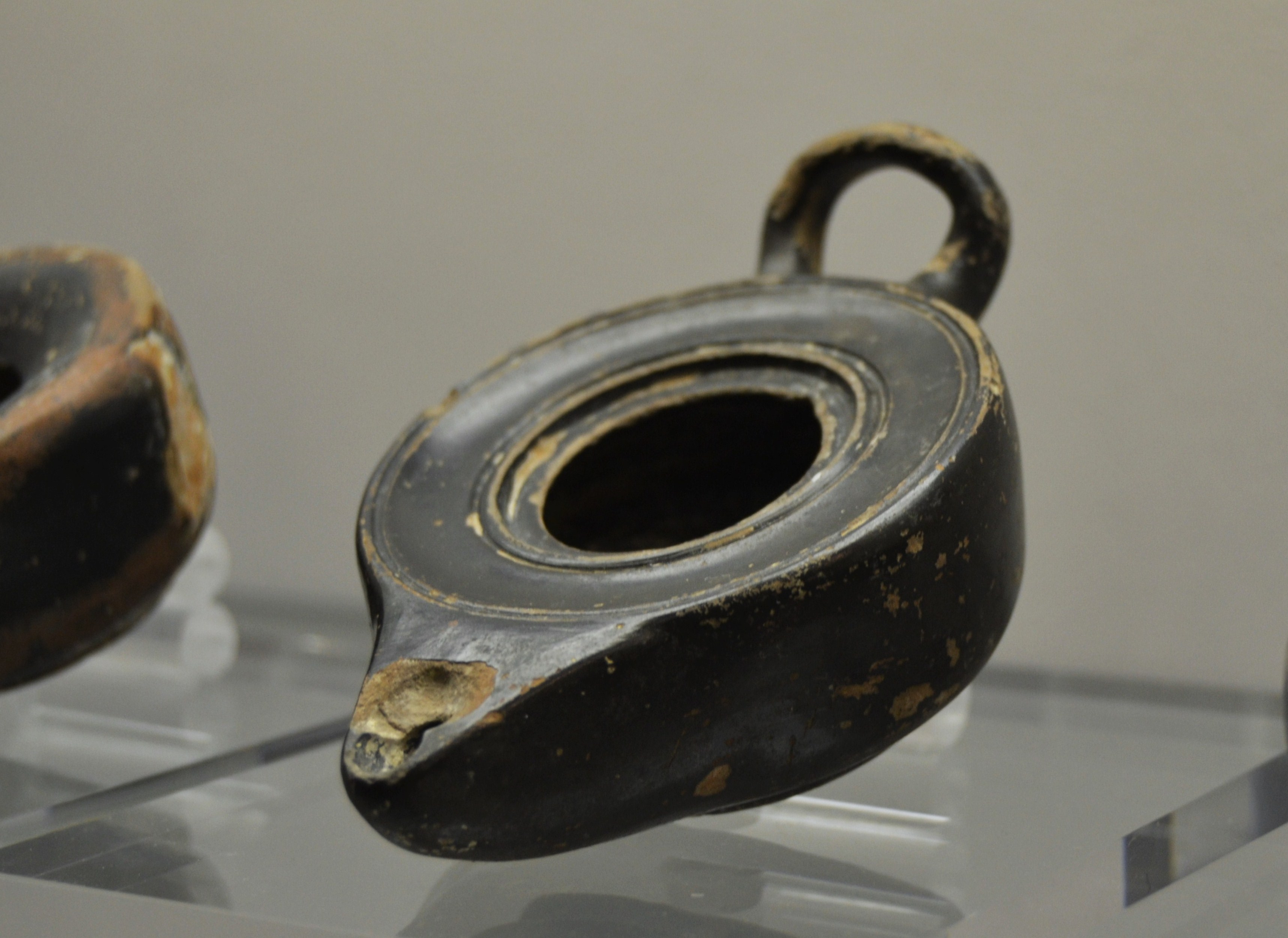 Llàntia grega de vernís negre, meitat del segle IV aC, Museu de la Ciutat (València).